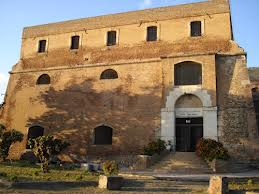 Fort Moussa, dit fort Barral, (Classé, 1930)